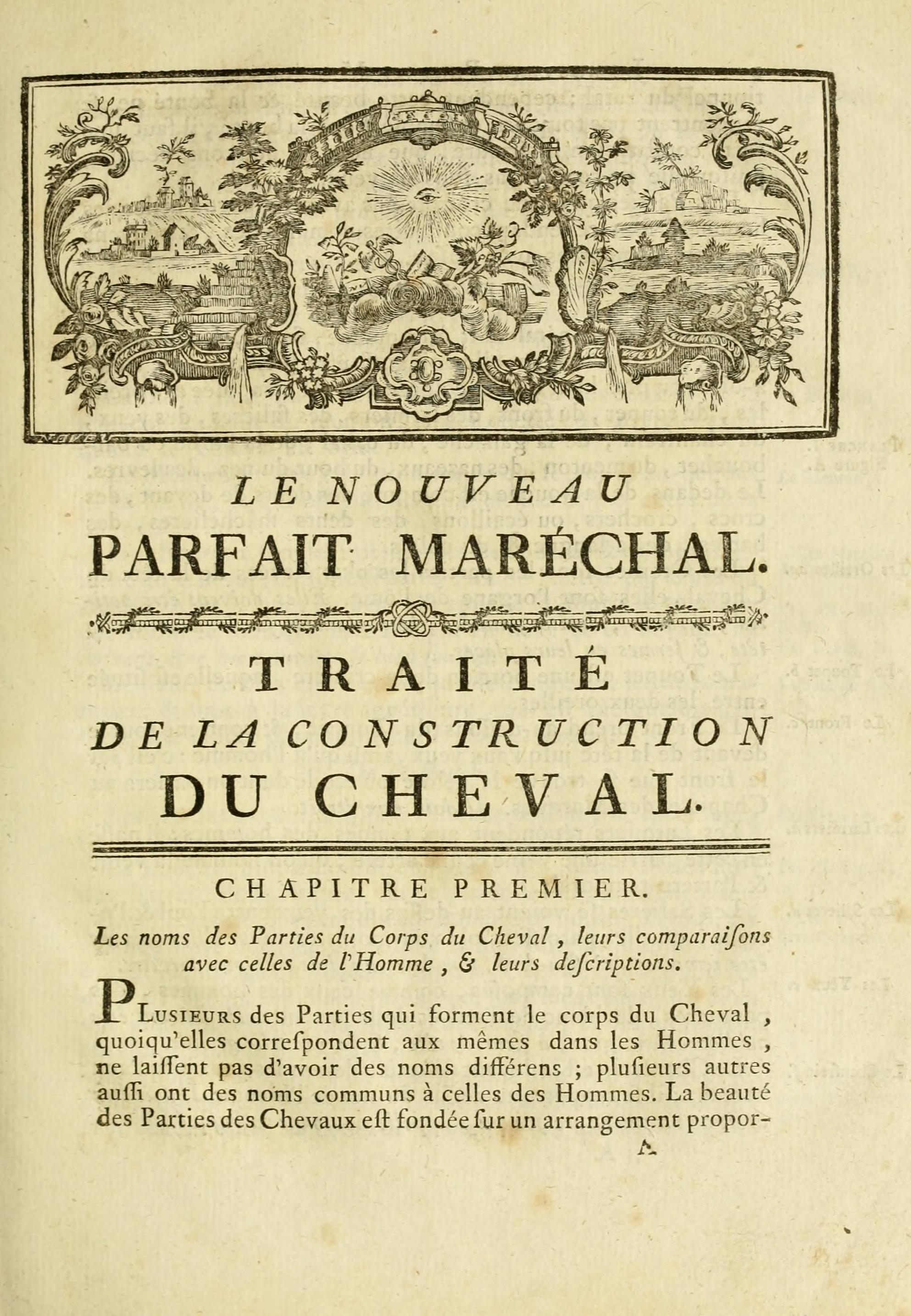 Le nouveau parfait marechal, ou, La connoissance générale et universelle du cheval ... : avec un dictionnaire des termes de cavalerie : le tout enrichi de figures en taille-douce / par M. Fr. A. de Garsault, ci-devant Capitaine en survivance du Haras du Roi.